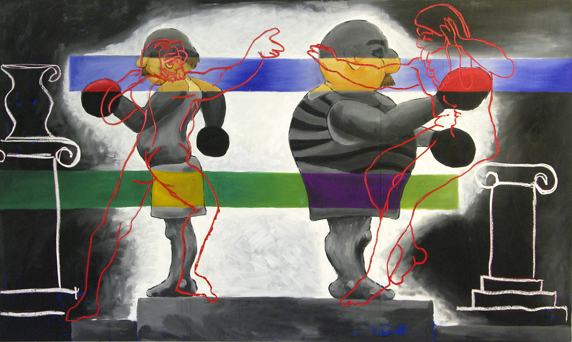 Schattenboxen als Aggressionsersatz mit linienhaften Anspielungen an altgriechische sportliche Traditionen.